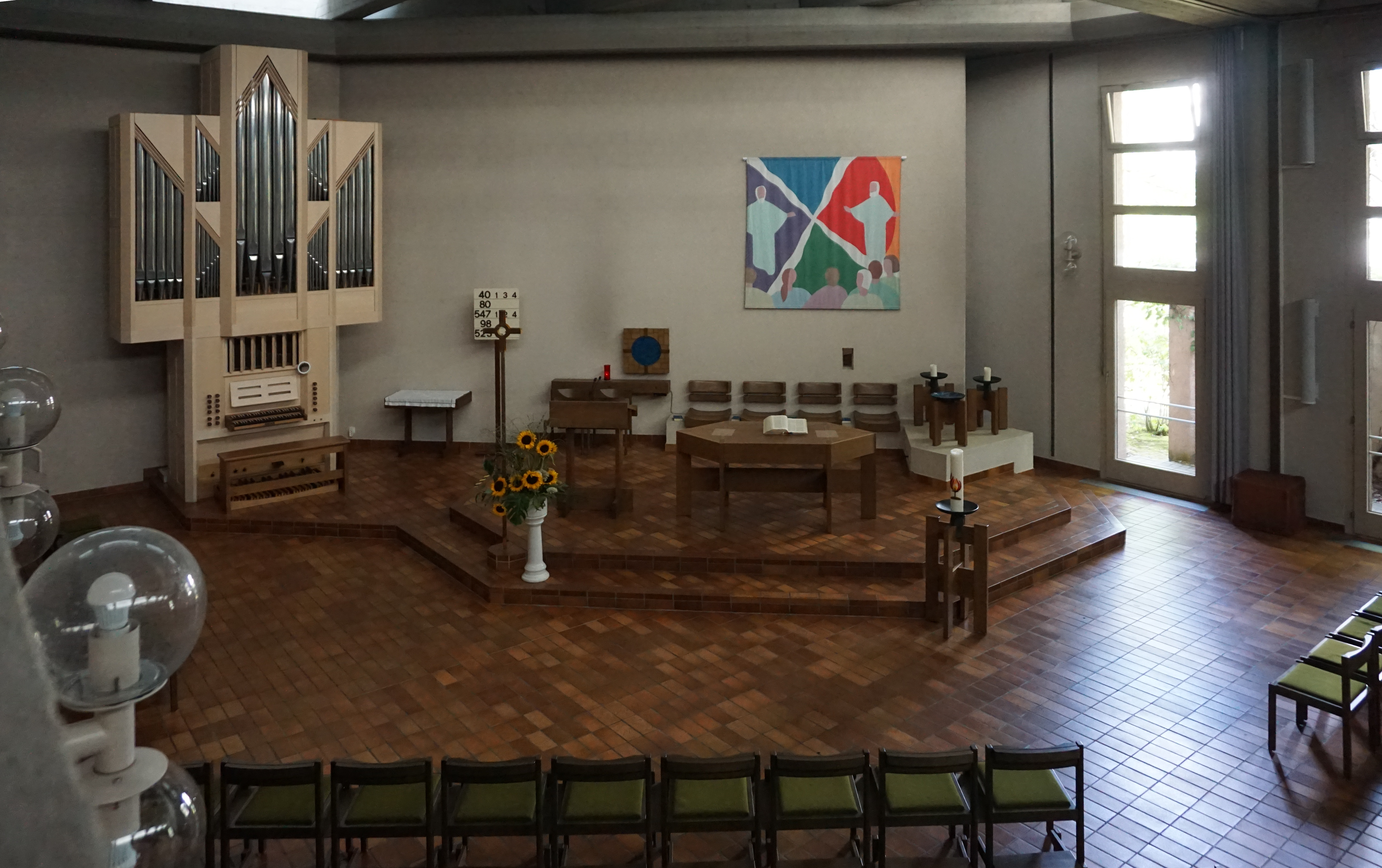 Altarraum der katholischen Peter und Paul Kirche mit Orgel, Sicht von der Empore.